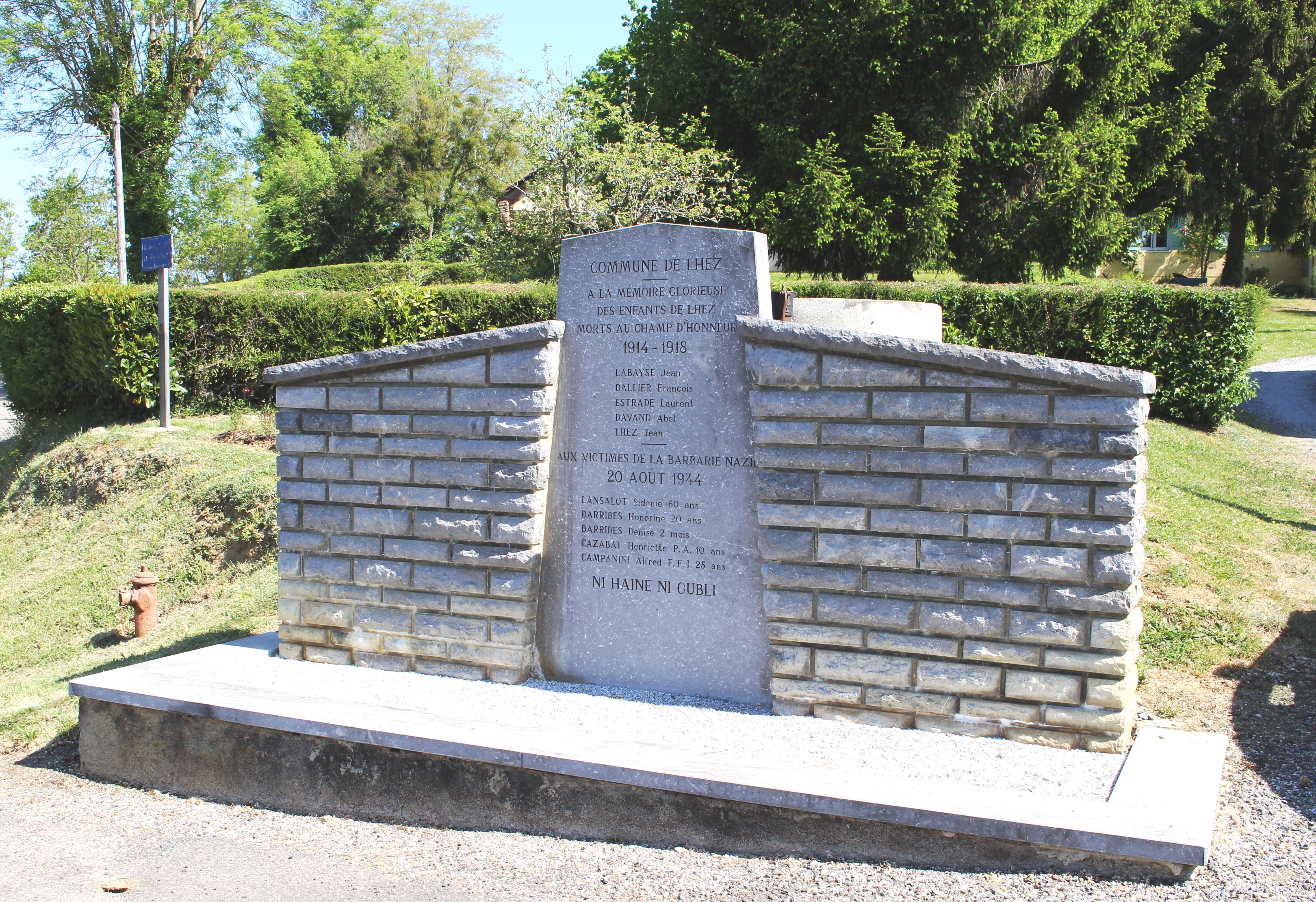 Monument aux morts de Lhez (Hautes-Pyrénées)